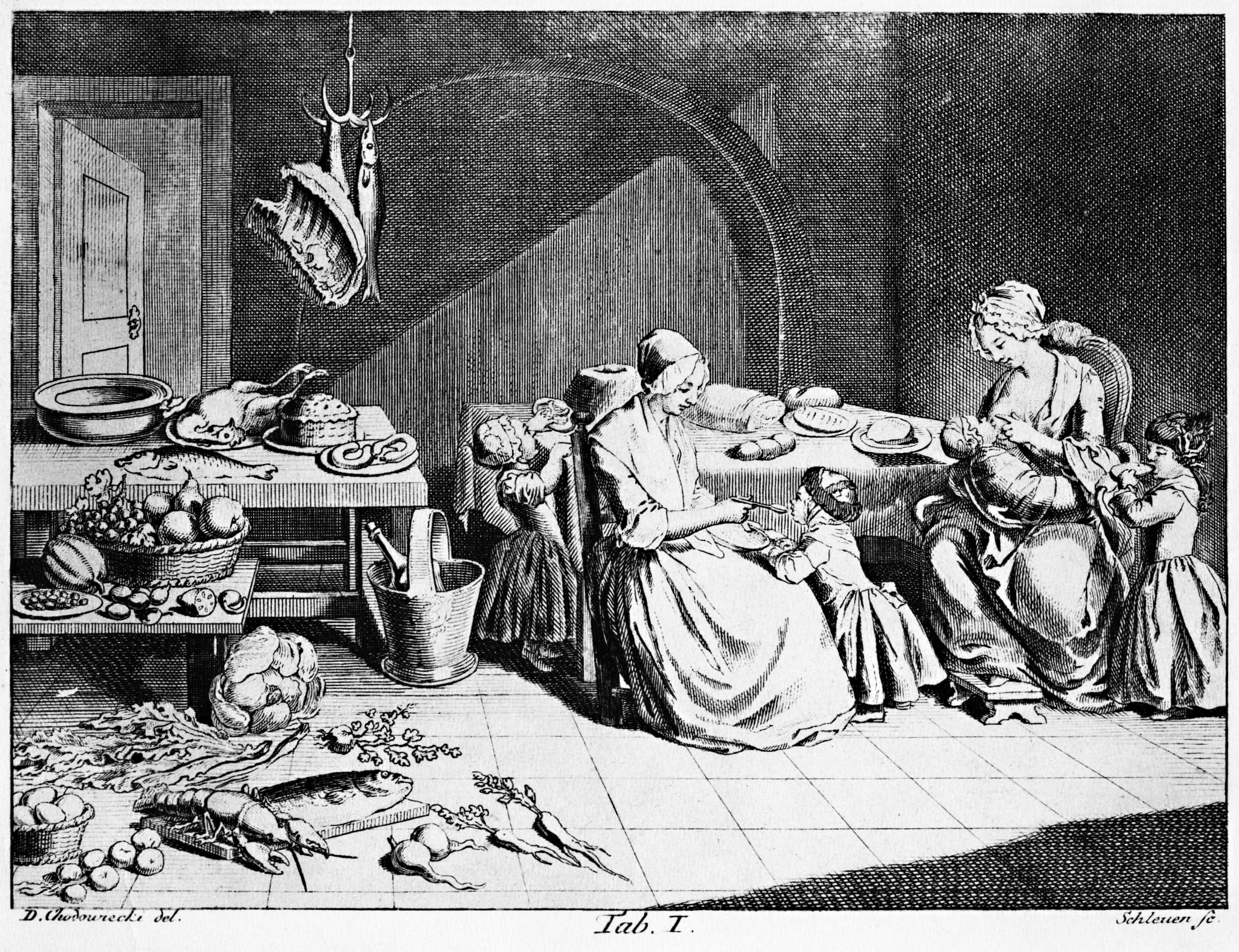 Tafel I. Die meisten Arten der Nahrungsmittel. (Beschreibung lt. Quelle)